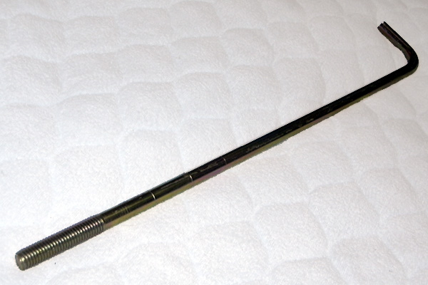 アンカーボルト_M12_01.jpg